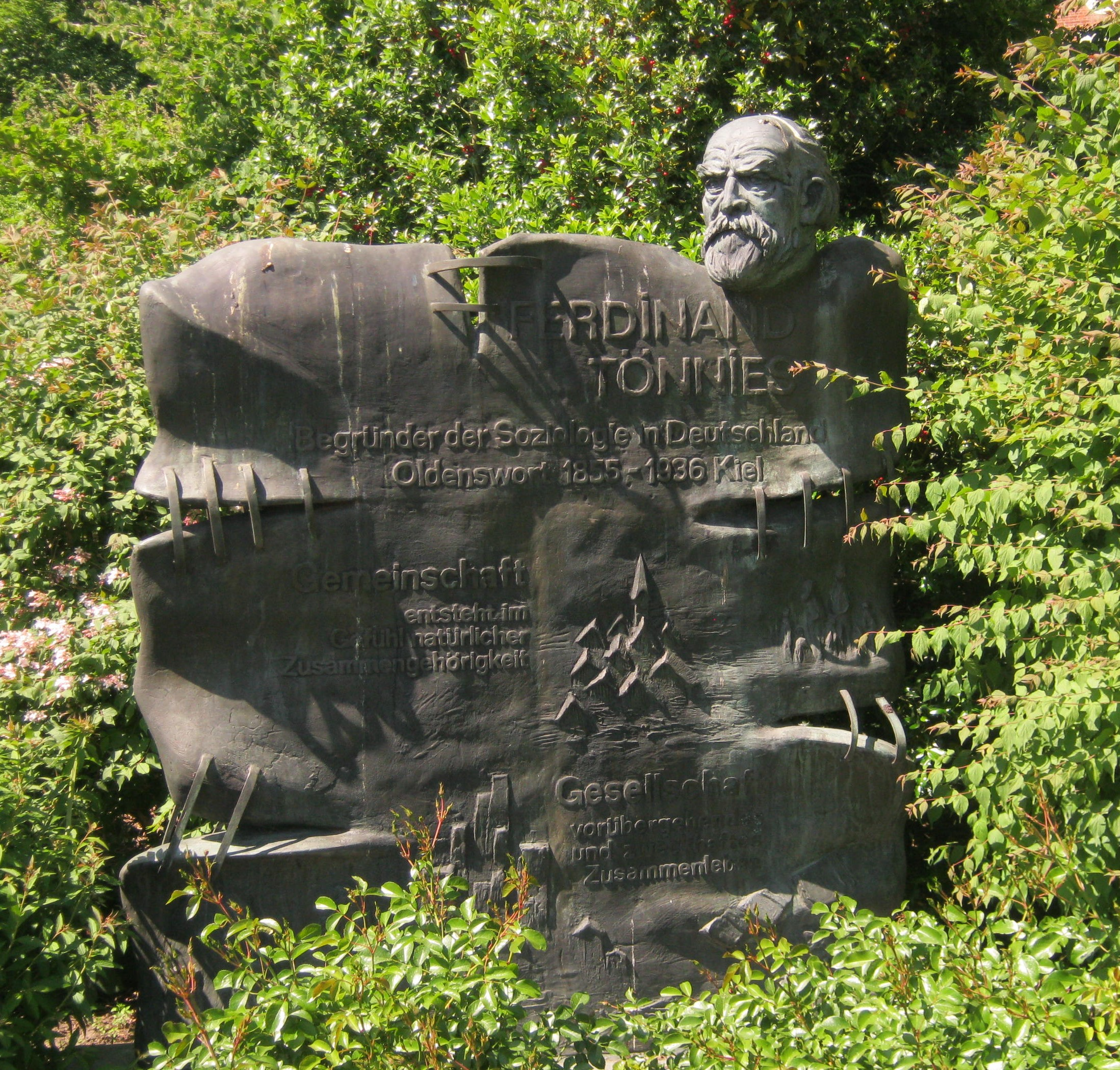 Tönnies-Denkmal in Oldesnwort